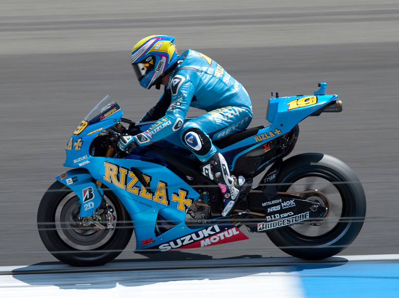 alvaro bautista